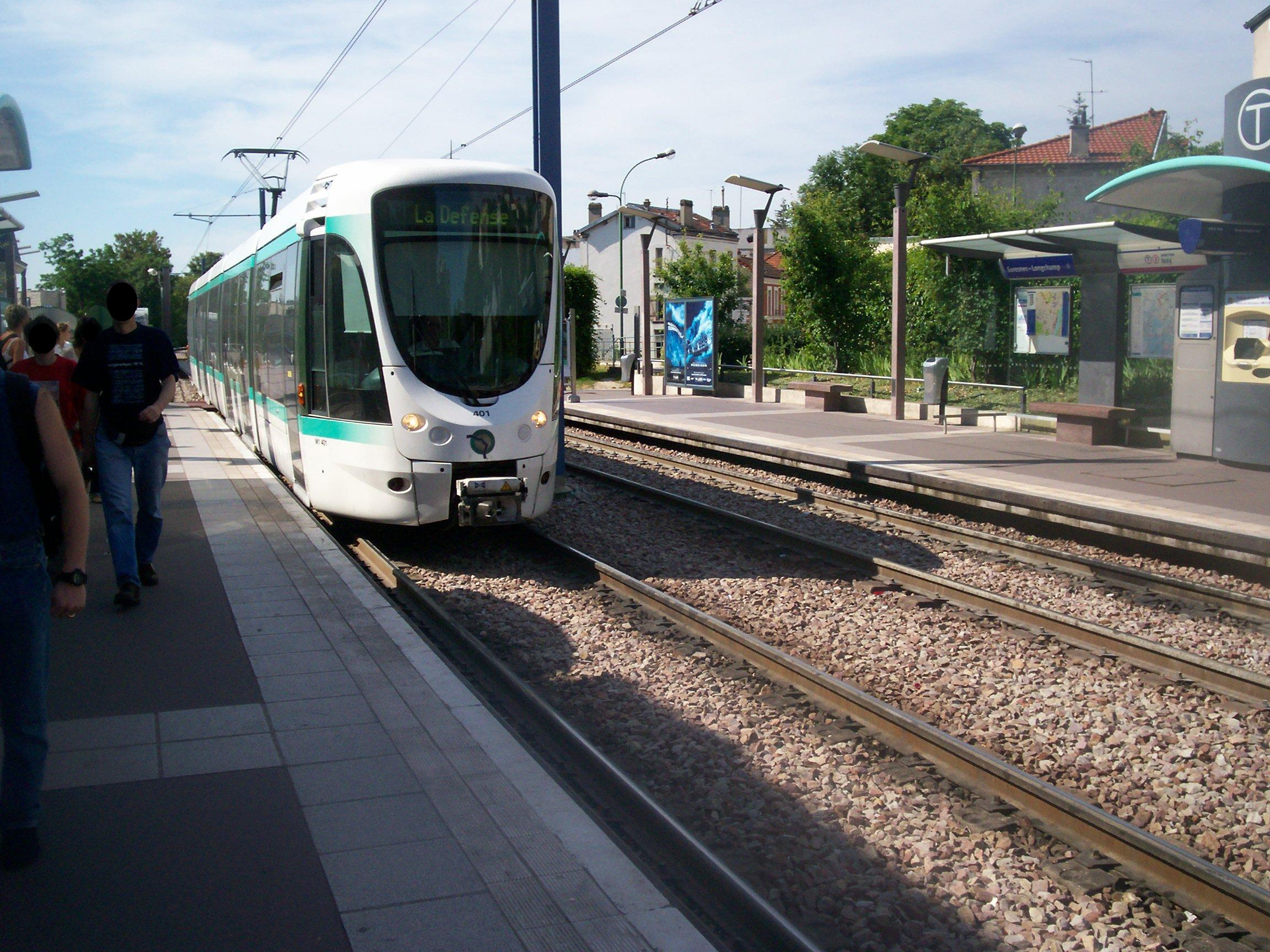 Paris Tramway ligne 2